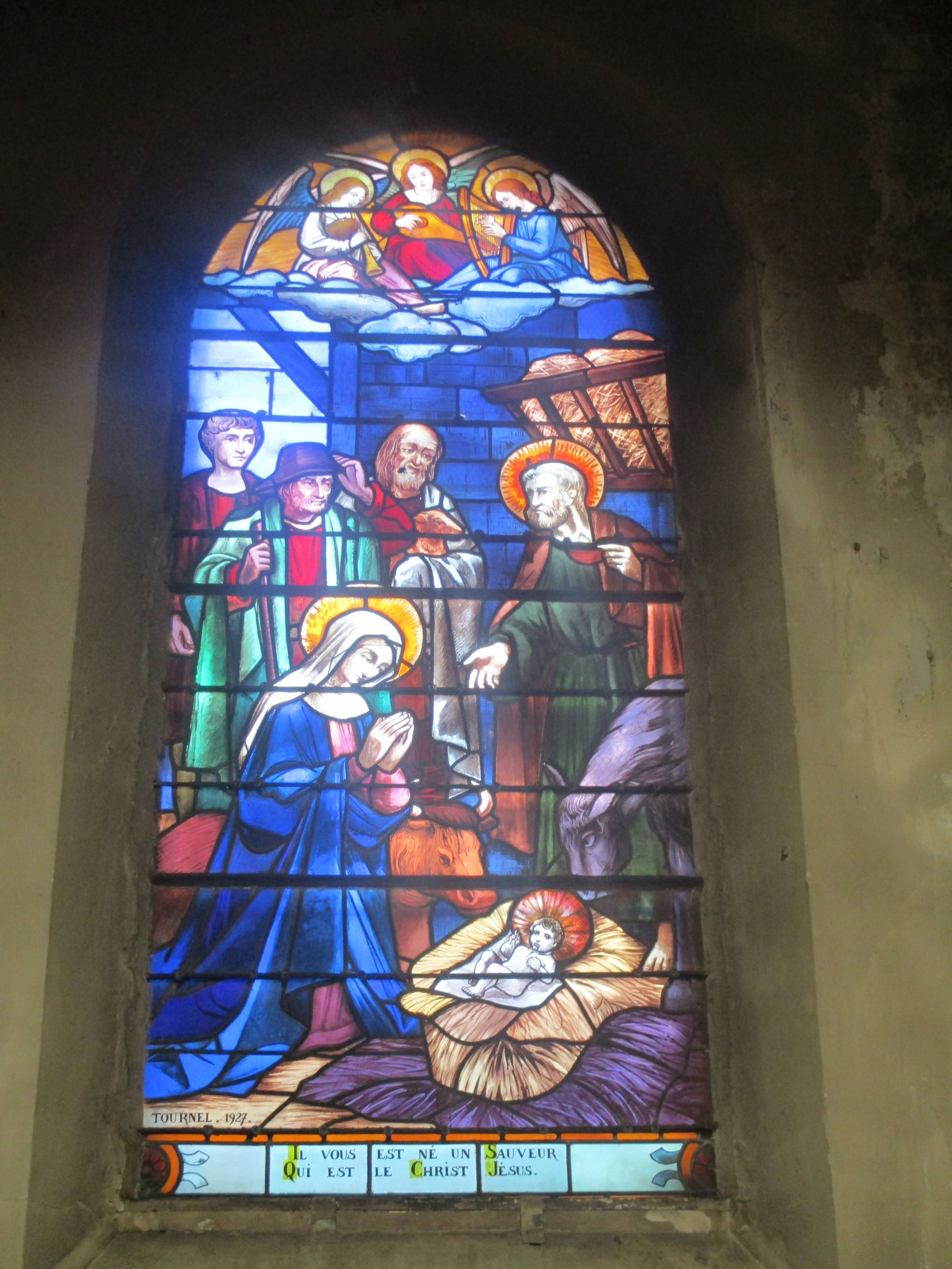 Vitrail de l'église Sainte-Marthe des Quatre-Chemins de Pantin. Vitrail de la Nativité Il vous est né un Sauveur qui est le Christ Jésus. Vitrail de Tournel frères 1927.